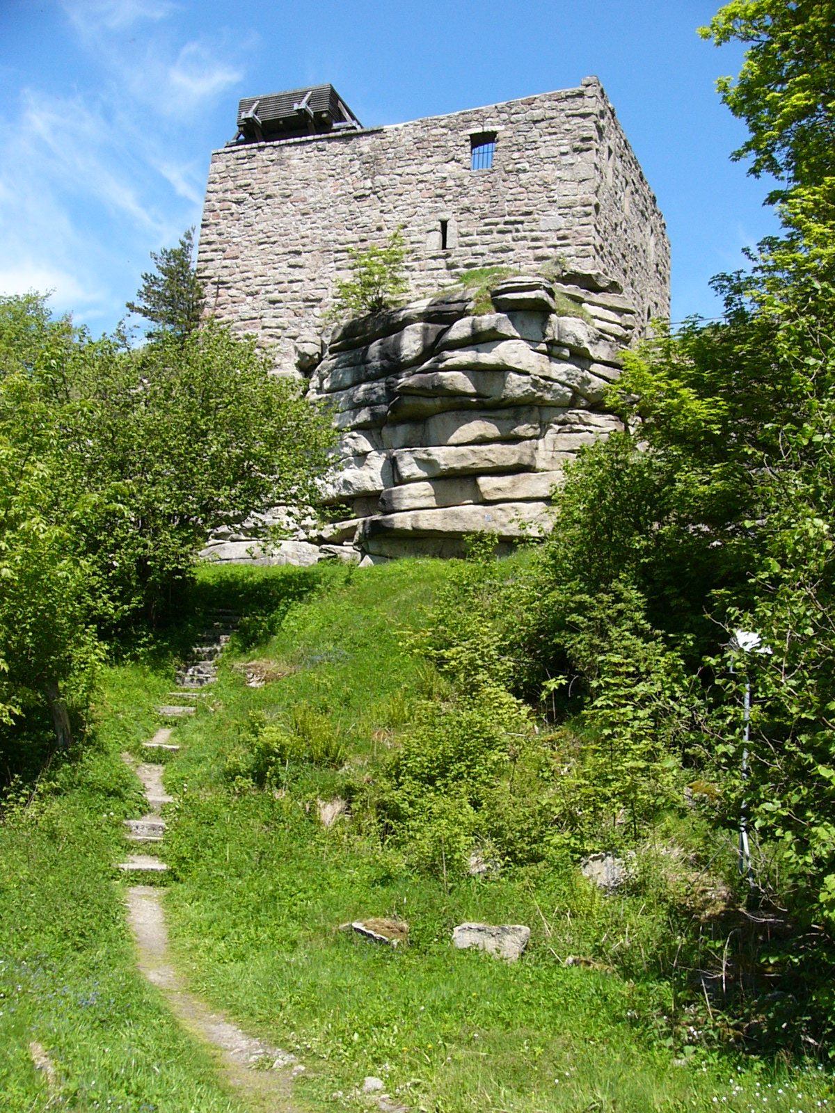 Haupthaus, Burgruine Epprechtstein